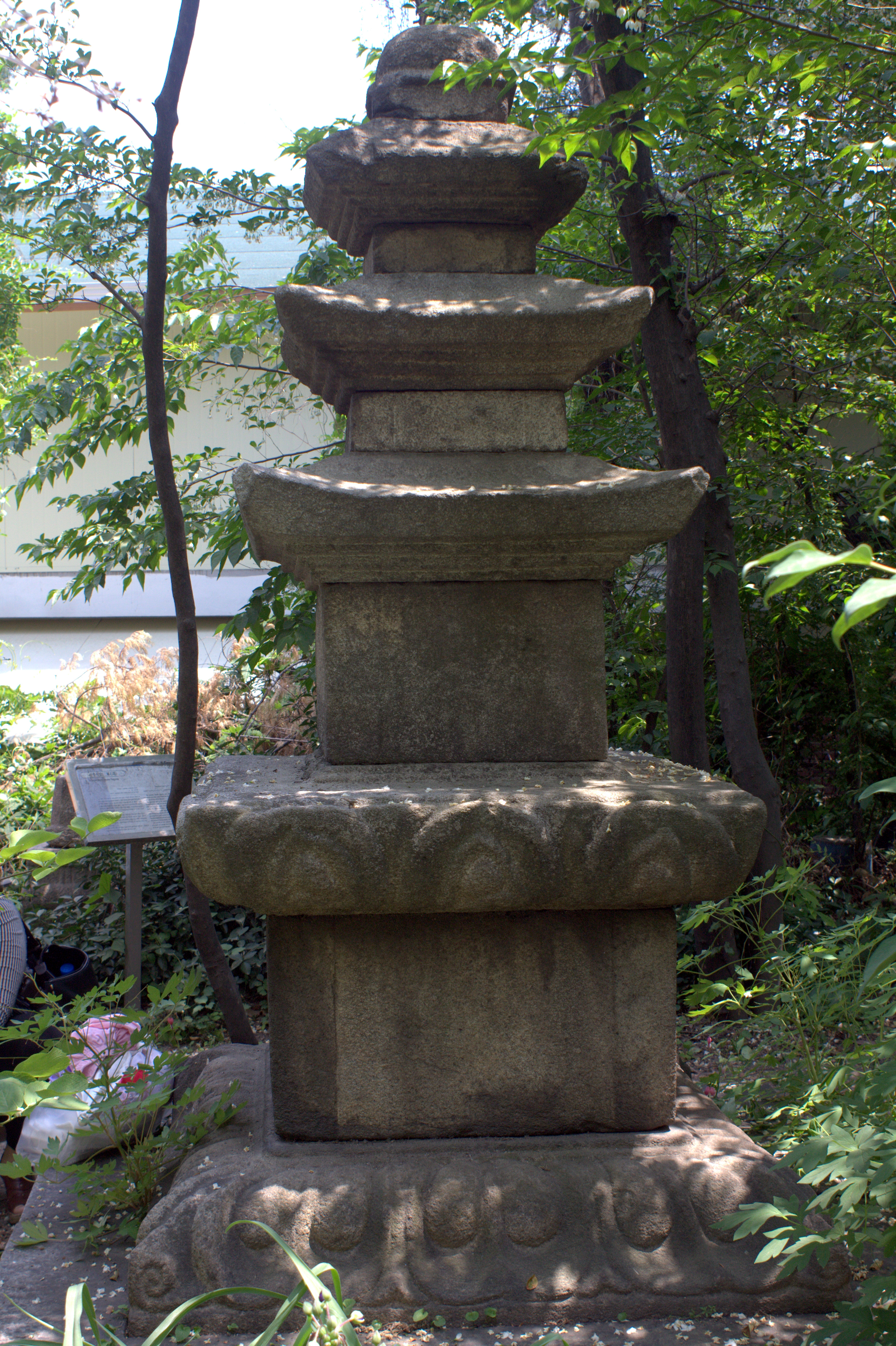 간송미술관 소재 삼층석탑